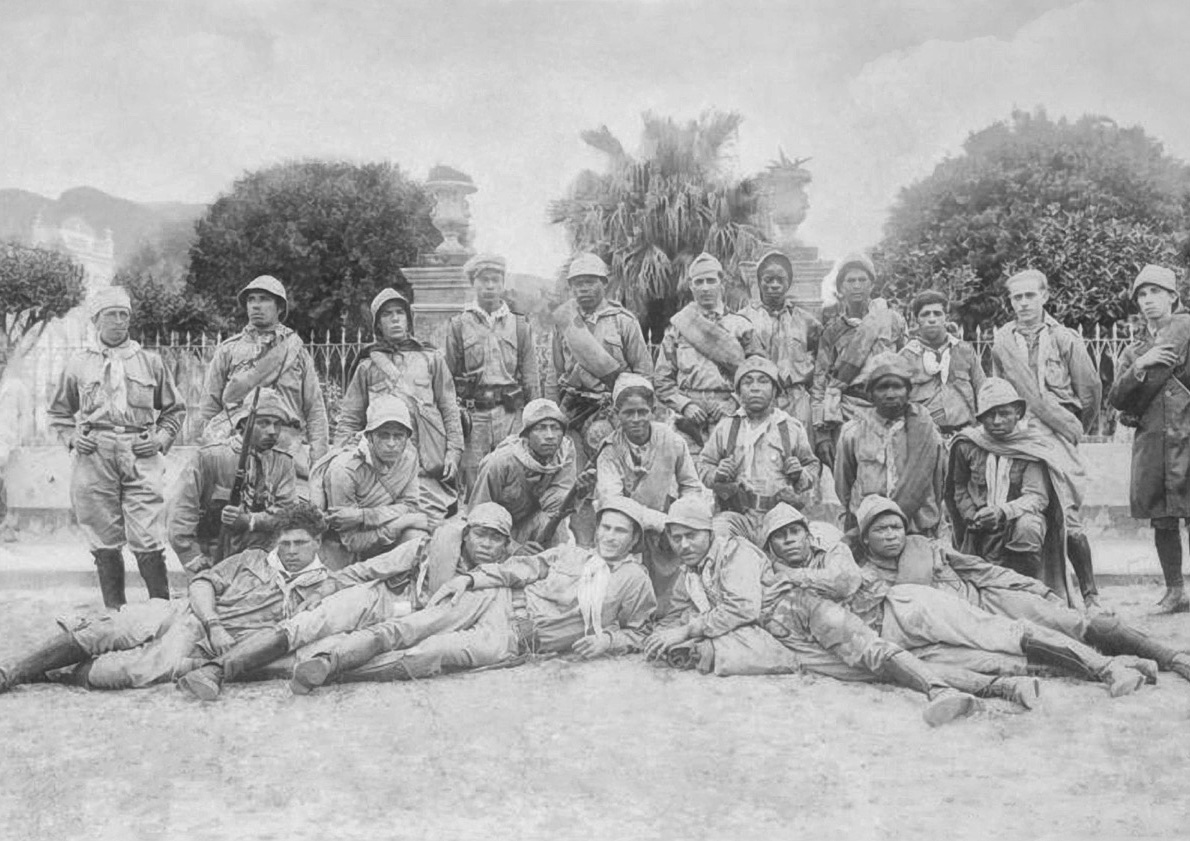 Defronte ao antigo jardim do Largo da Igreja Matriz (atual Basílica do Senhor Bom Jesus de Iguape e Nossa Senhora das Neves). Em 4 de agosto de 1932, parte para Juquiá, sob aclamação cívica, o vapor Rio de Una, levando os voluntários do destacamento do "Batalhão Redentor Filhos de Iguape" para combater as forças Getulistas lá instaladas.